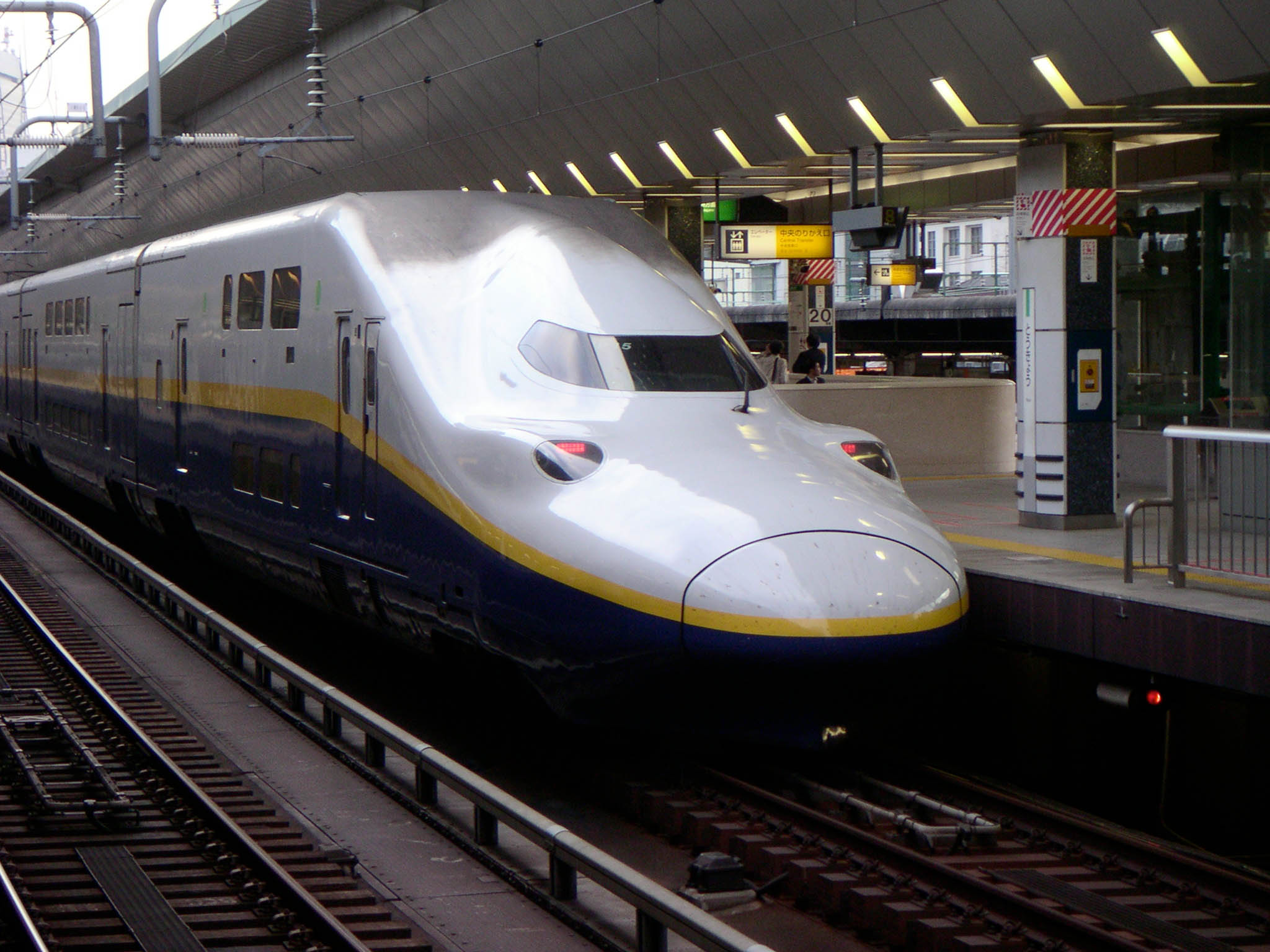 E4 series Shinkansen train at Tokyo Station, Tohoku Shinkansen